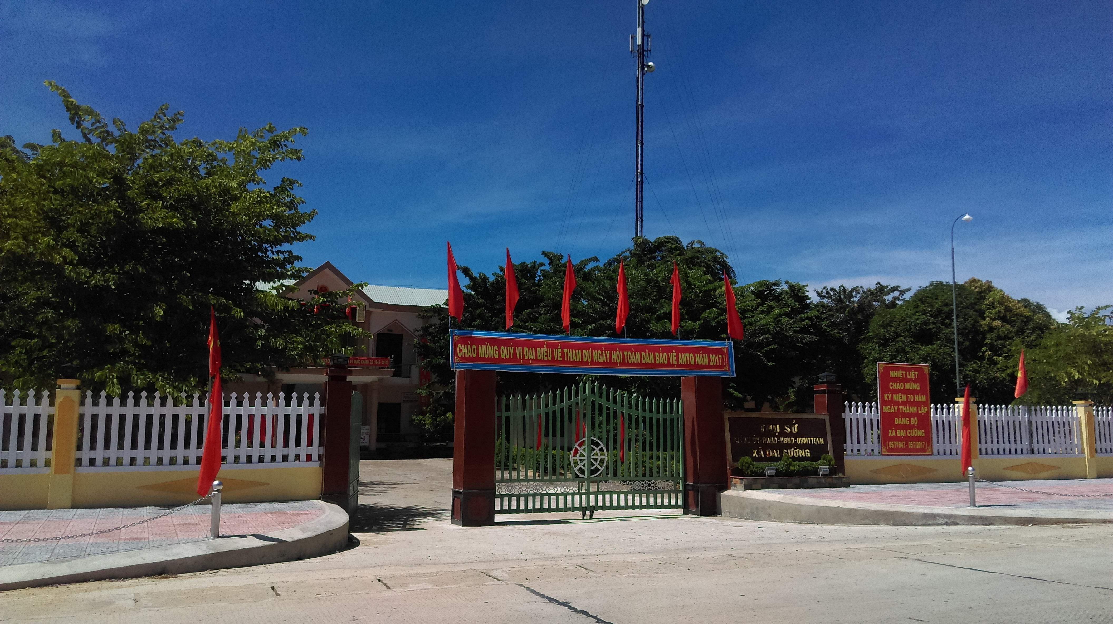 UBND xã Đại Cường, Đại Lộc, Quảng Nam